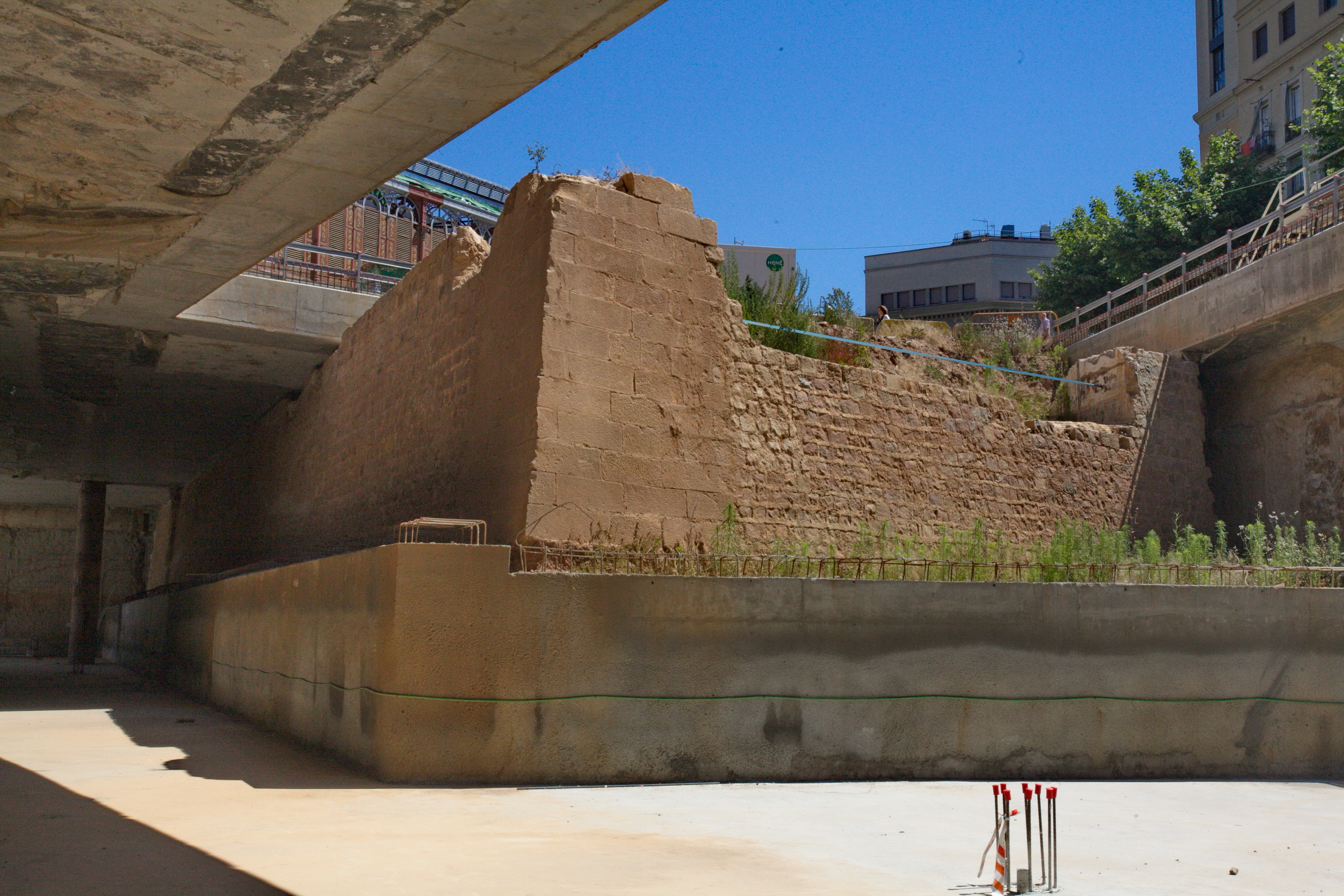 Mercat de Sant Antoni (Barcelona, 1879). Baluard Sant Antoni descobert durant les obres de remodelació.